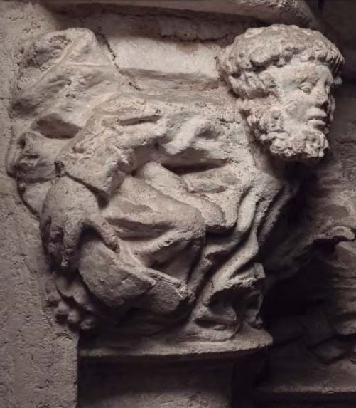 Retrato de Francesc Baldomar